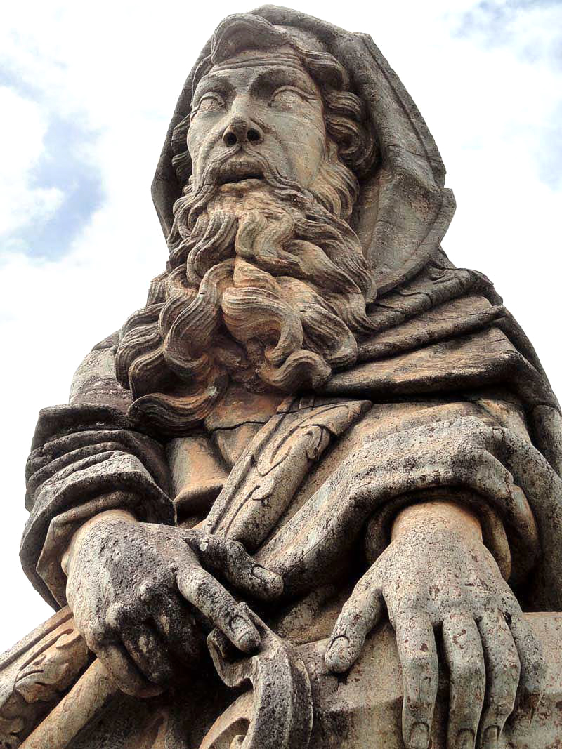 Profeta Isaías, de Aleijadinho, no Santuário de Congonhas